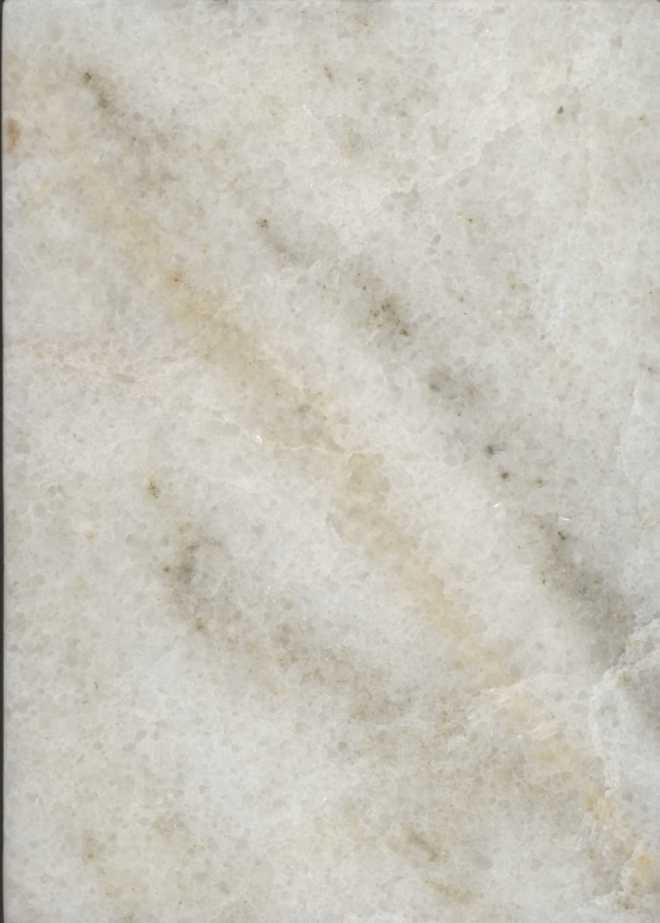 Crottendorfer Marmor, Region: Sachsen, Erzgebirge, Crottendorf